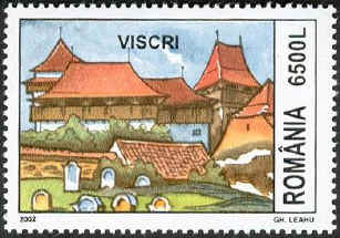 Source: Post of Romania